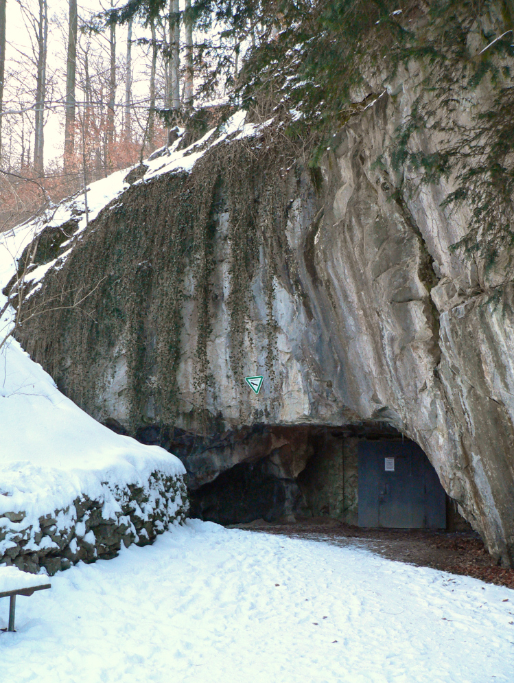 Alter Eingang der Iberger Tropfsteinhöhle